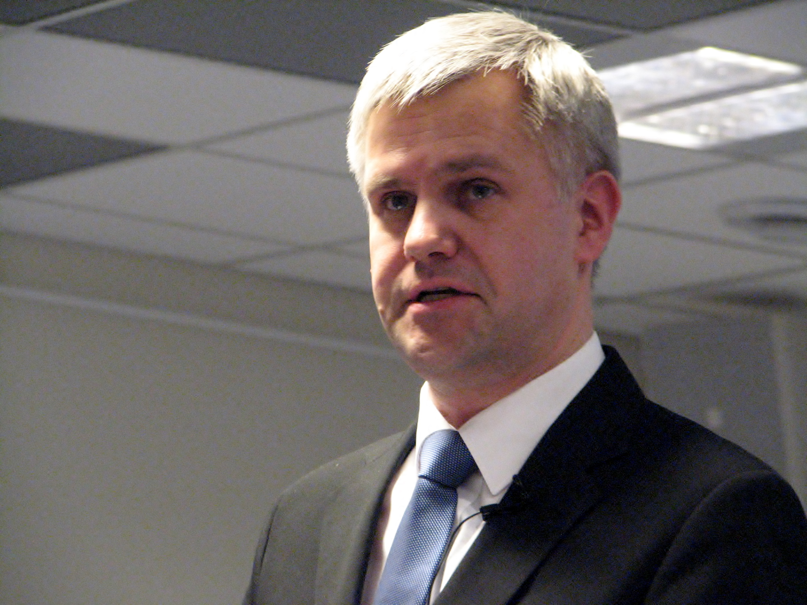 Mihkel Volt retrospektiivse rahvusbibliograafia 4-köitelise väljaande "Eestikeelne raamat 1918–1940" esitlusel